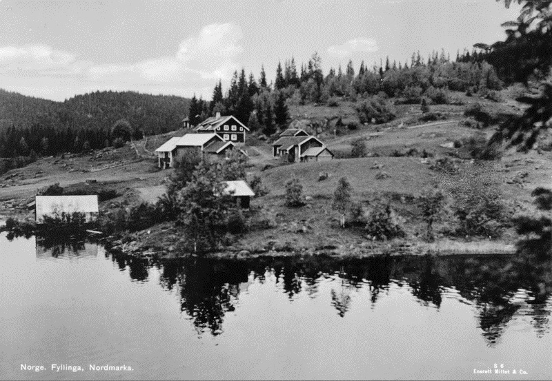 Gården Fyllingen i Oslo nordmark